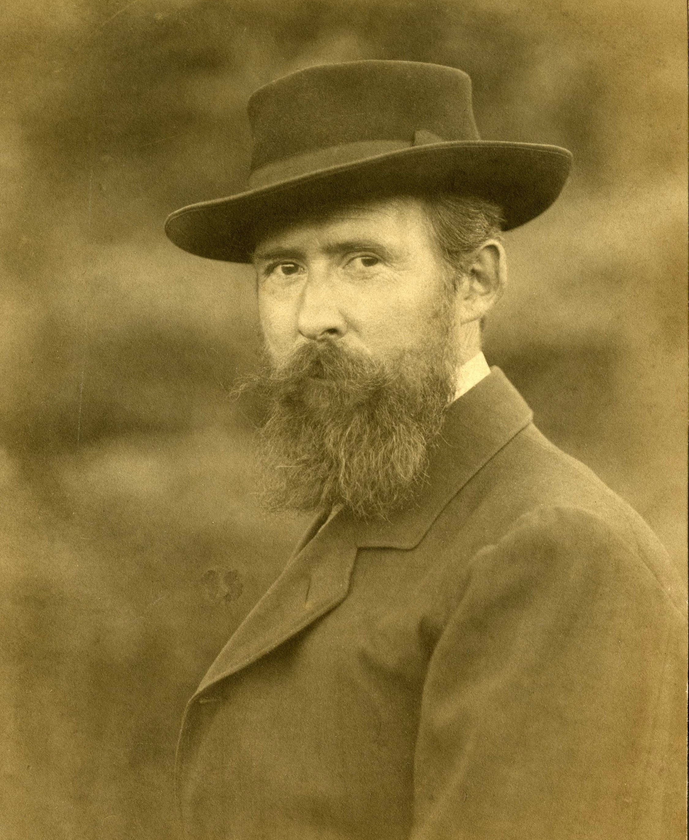 Porträt des Künstler in Karlsruhe